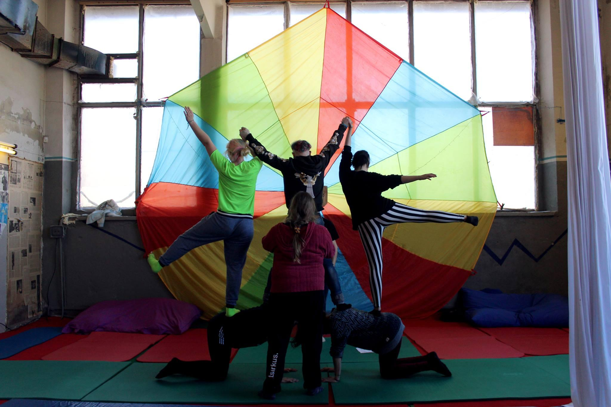 Ülemaailmne sotsiaalse tsirkuse päev 2016